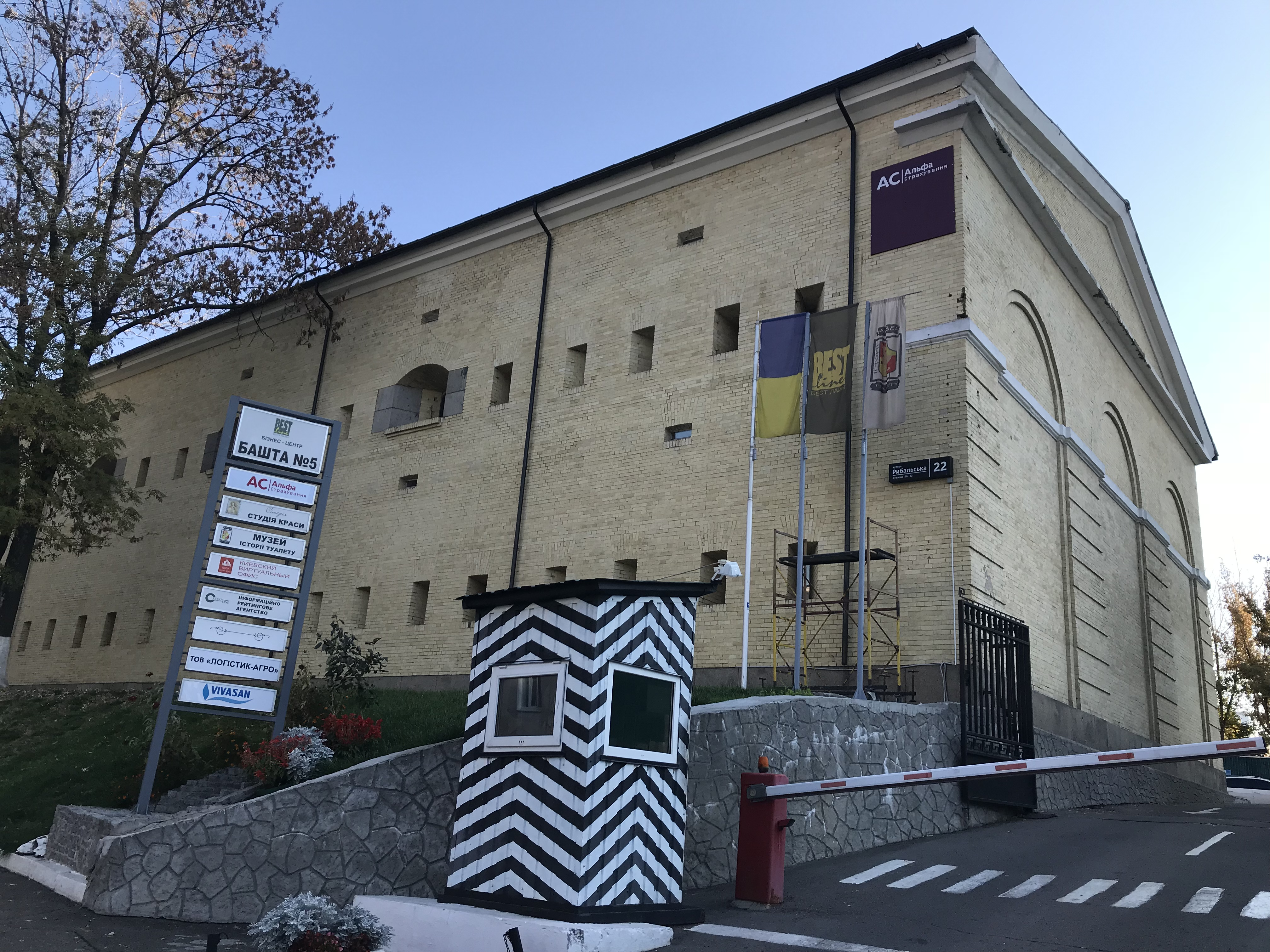 Фасад головного офісу СК "Альфа Страхування"